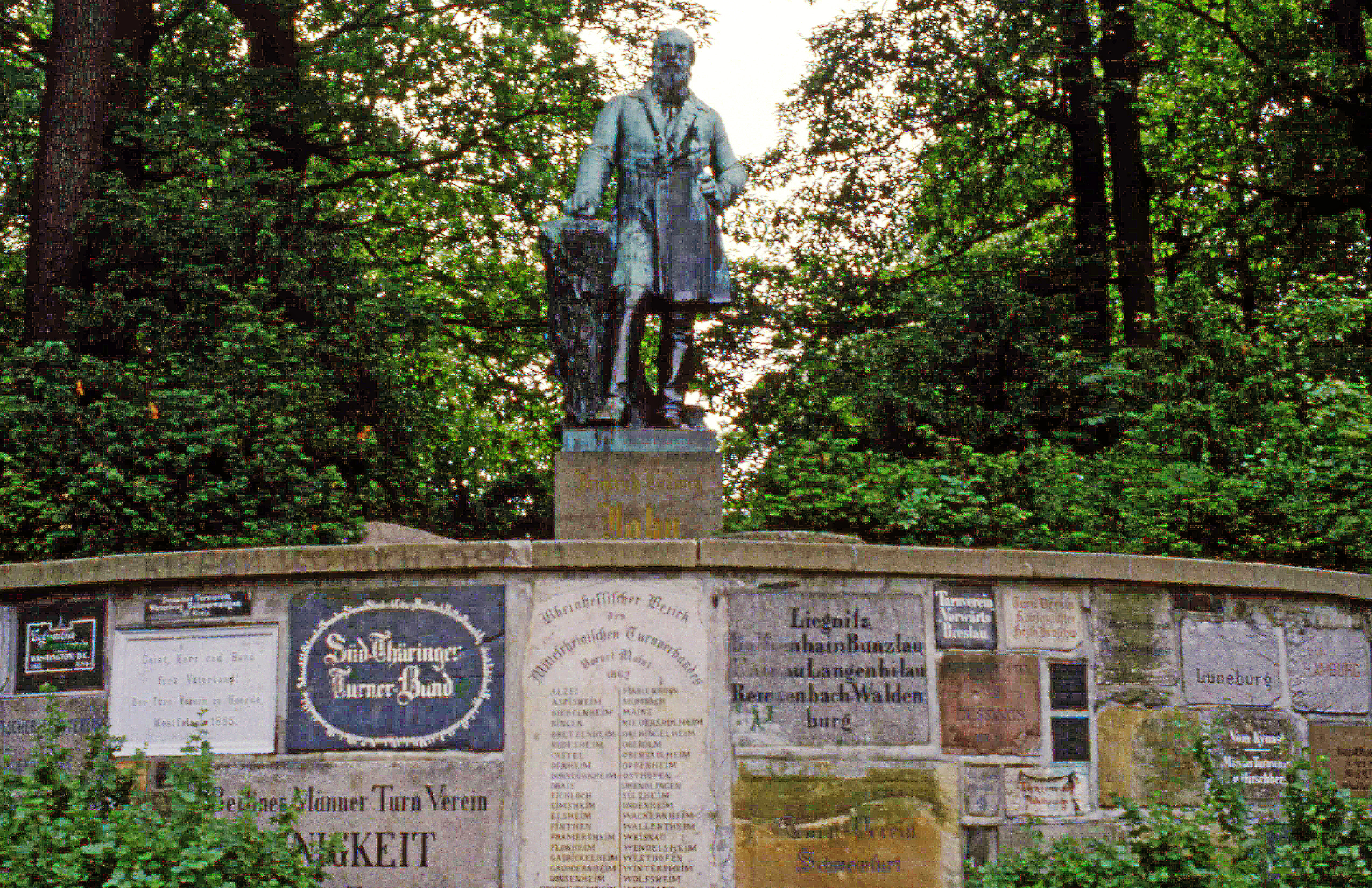 Statue von Friedrich Ludwig Jahn in der Hasenheide, Berlin. Erdmann Encke, 1872.